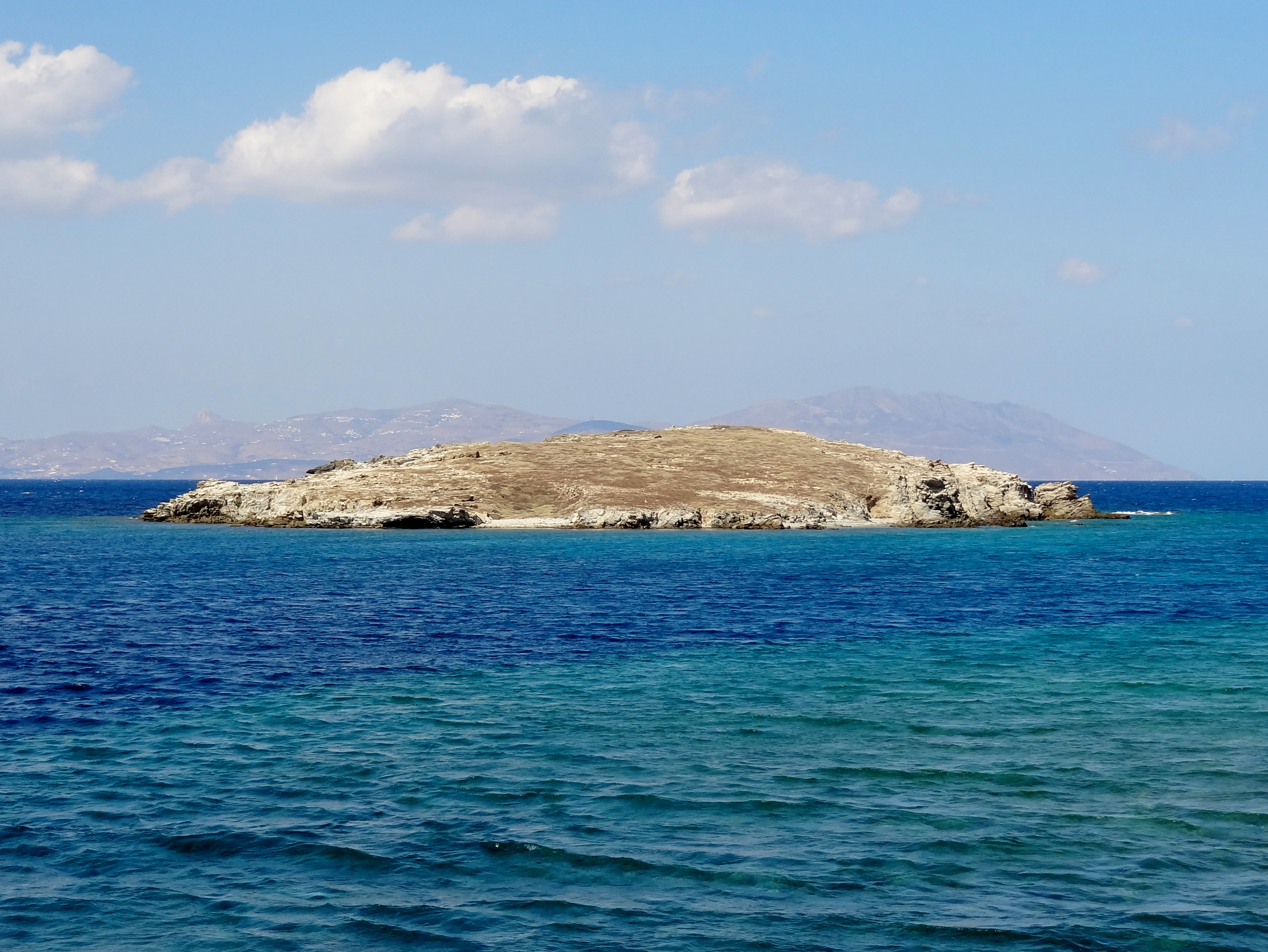 Südküste von Mikros Rematiaris vor der Westküste von Delos, Kykladen, Griechenland